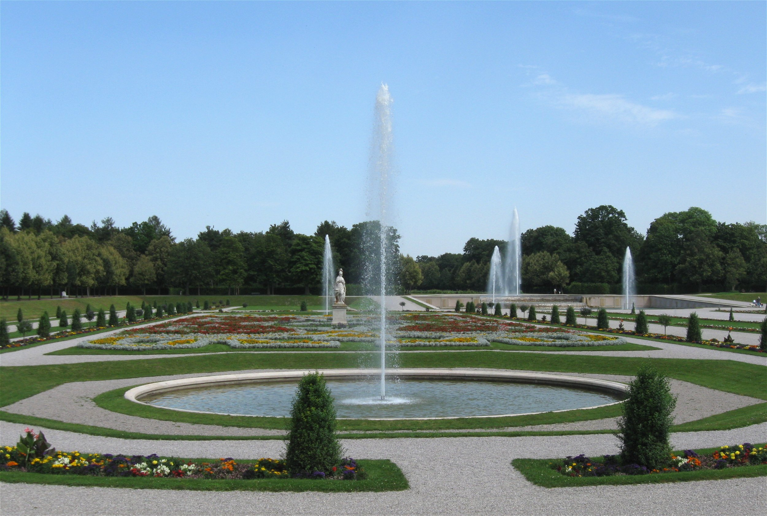 Neues Schloss Schleissheim, Gartenparterre